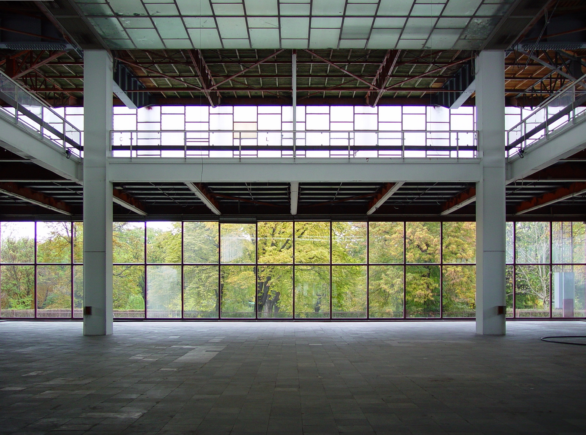 Innenraum des 20er Hauses